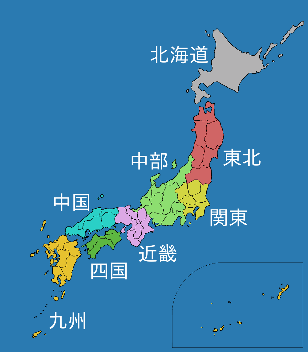 日本の八地方区分